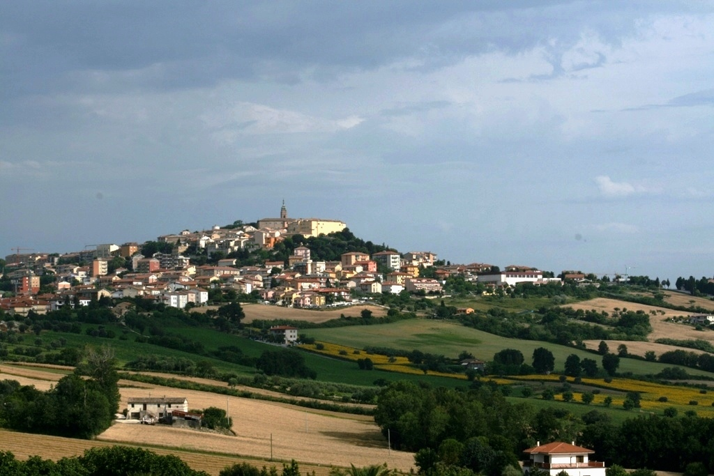 Camerano visto a Colle Lauro un giorno in cui il tempo urlava vendetta!.